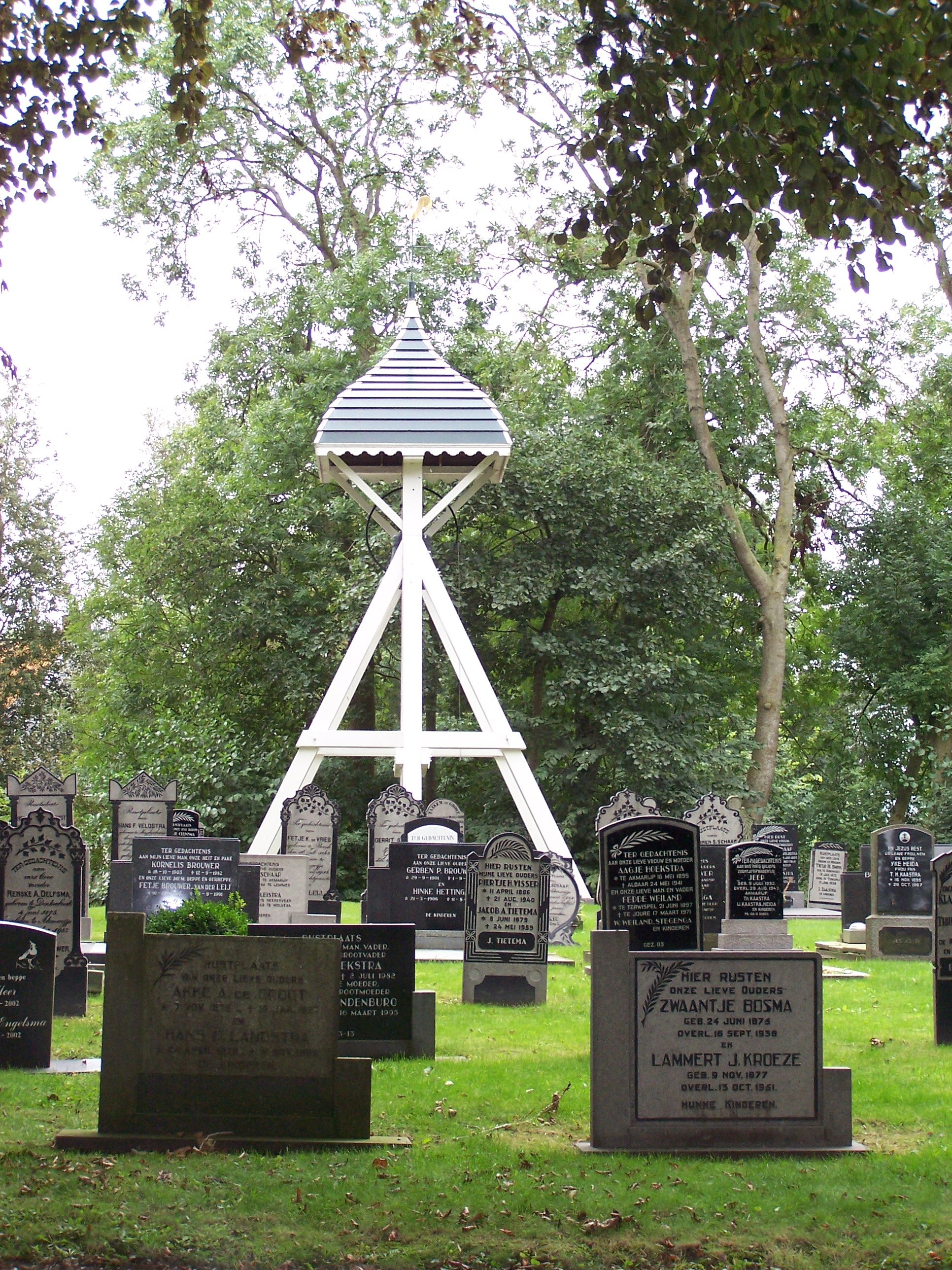 It klokhûs fan Eagmaryp.